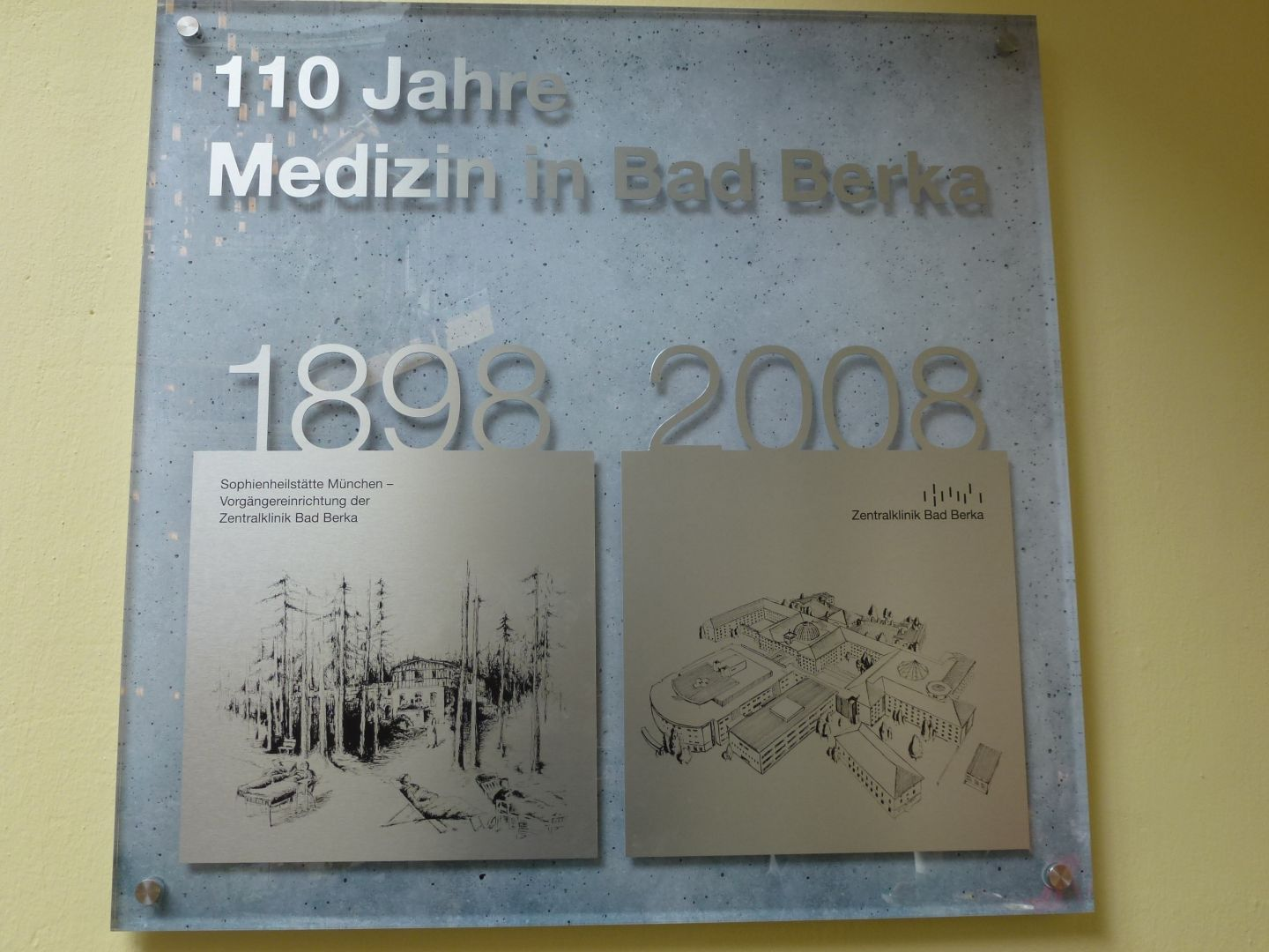 Tafel zur Geschichte der Zentralklinik